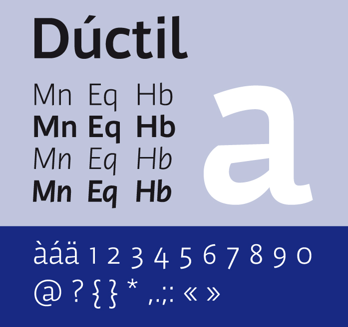 Lletra tipogràfica Dúctil